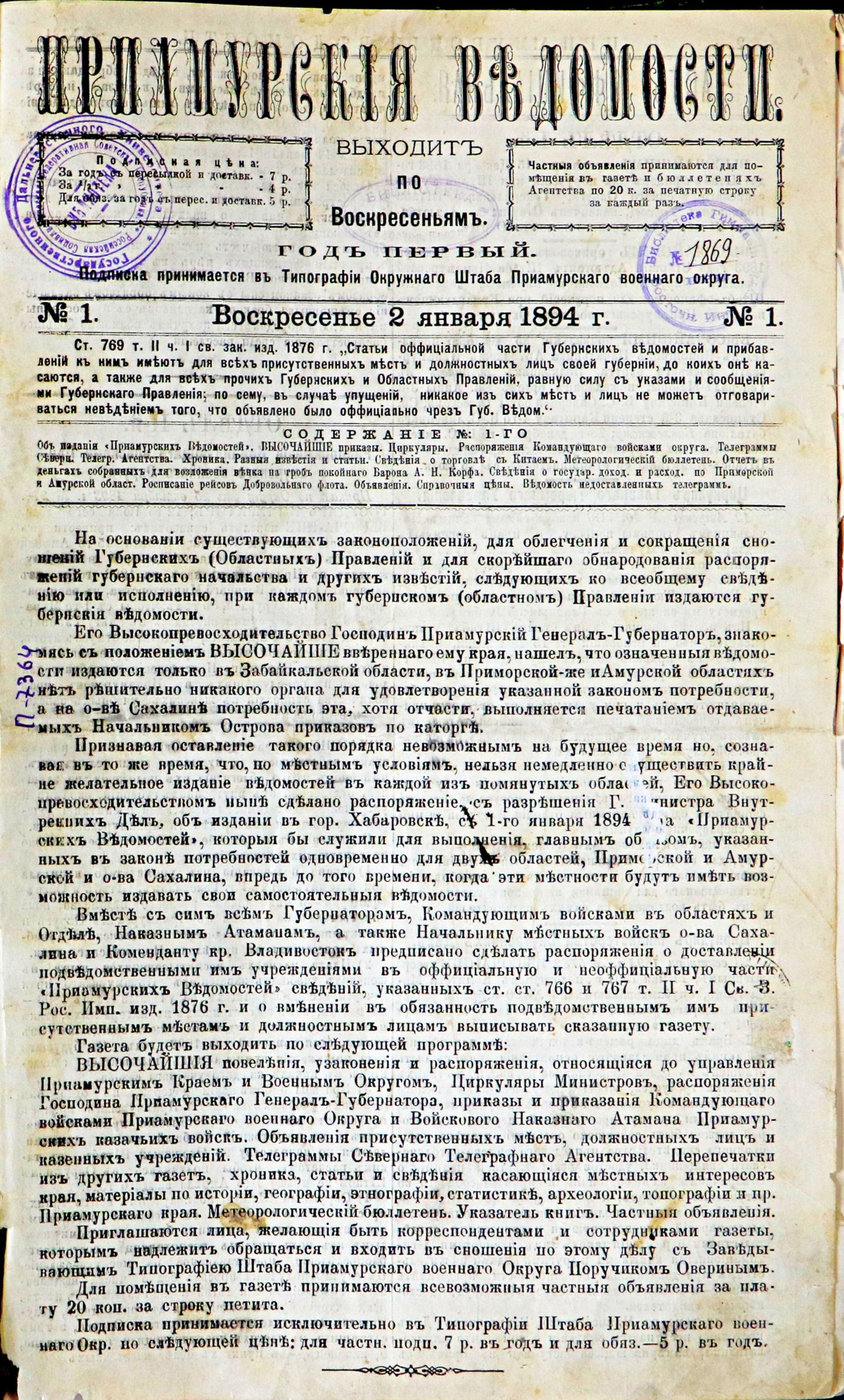 Приамурские ведомости, №1